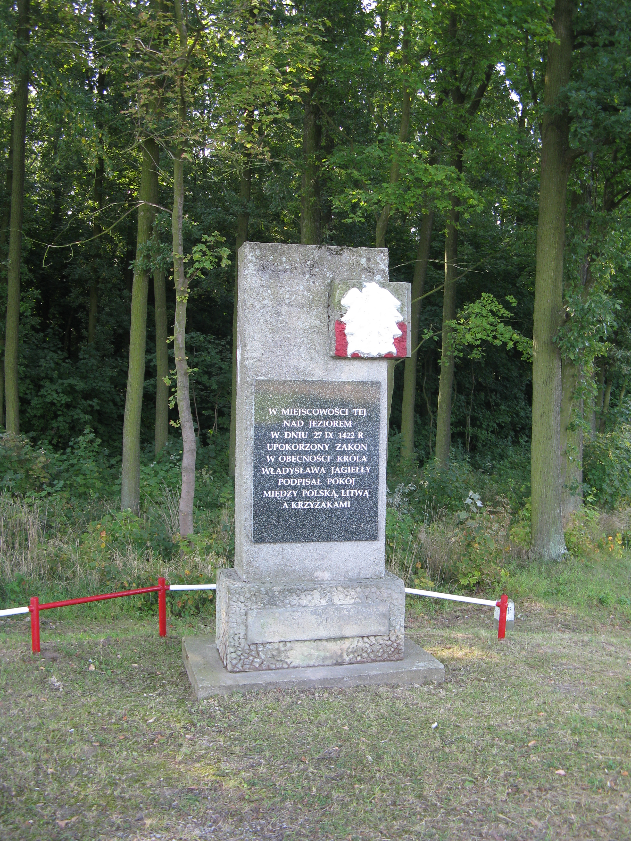 Pomnik zawarcia pokoju mełneńskiego w Mełnie